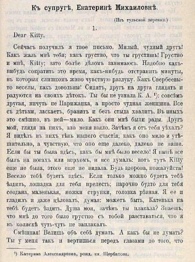 Письмо А. С. Хомякова к Е. М. Хомяковой